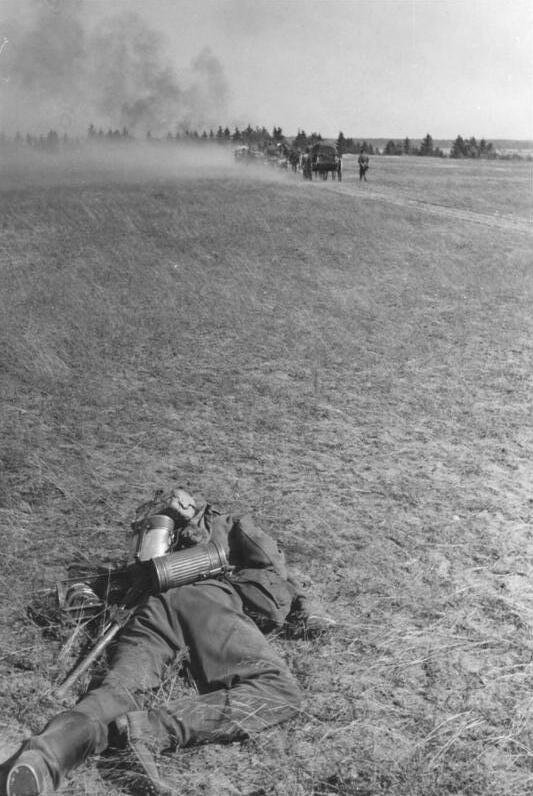 Prop.Kp. 612, Archiv-Nr. 20 2266 Bildberichter: Erich Bauer Ort: Lukty bei Witebsk Datum: 06.1941